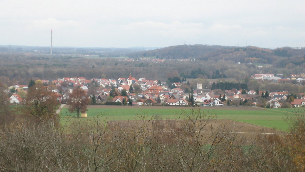 Blick auf Offingen vom Aussichtsturm Donautal